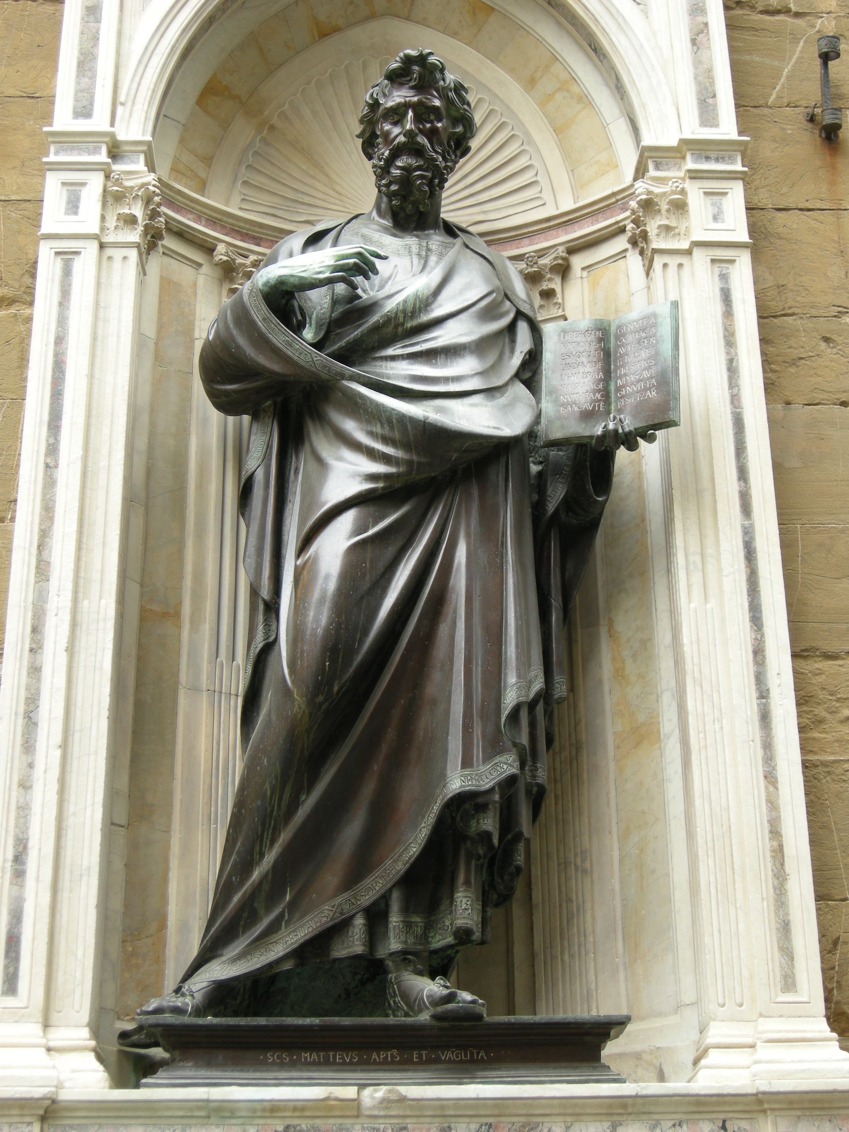 Orsanmichele, san matteo di Ghiberti